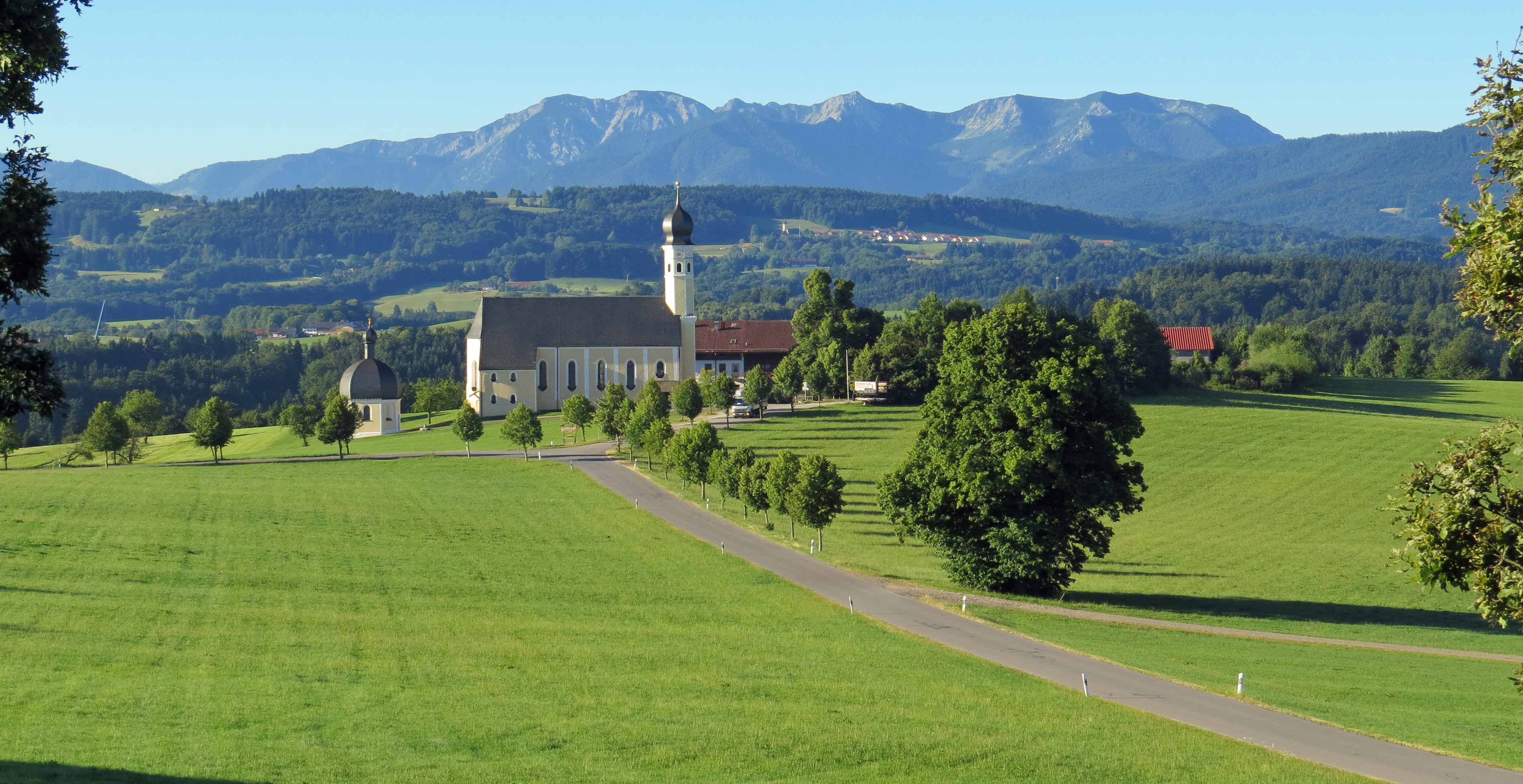 Wilparting, Irschenberg